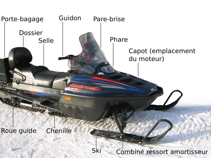 Explication des différentes composantes d'une motoneige